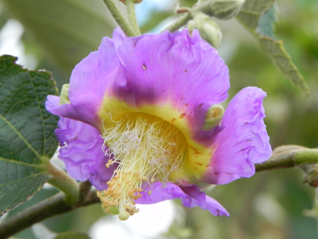 Luehea paniculata Mart. & Zucc. - MALVACEAE - Parque Nacional de Brasília - Brasília - Distrito Federal - Brasil.